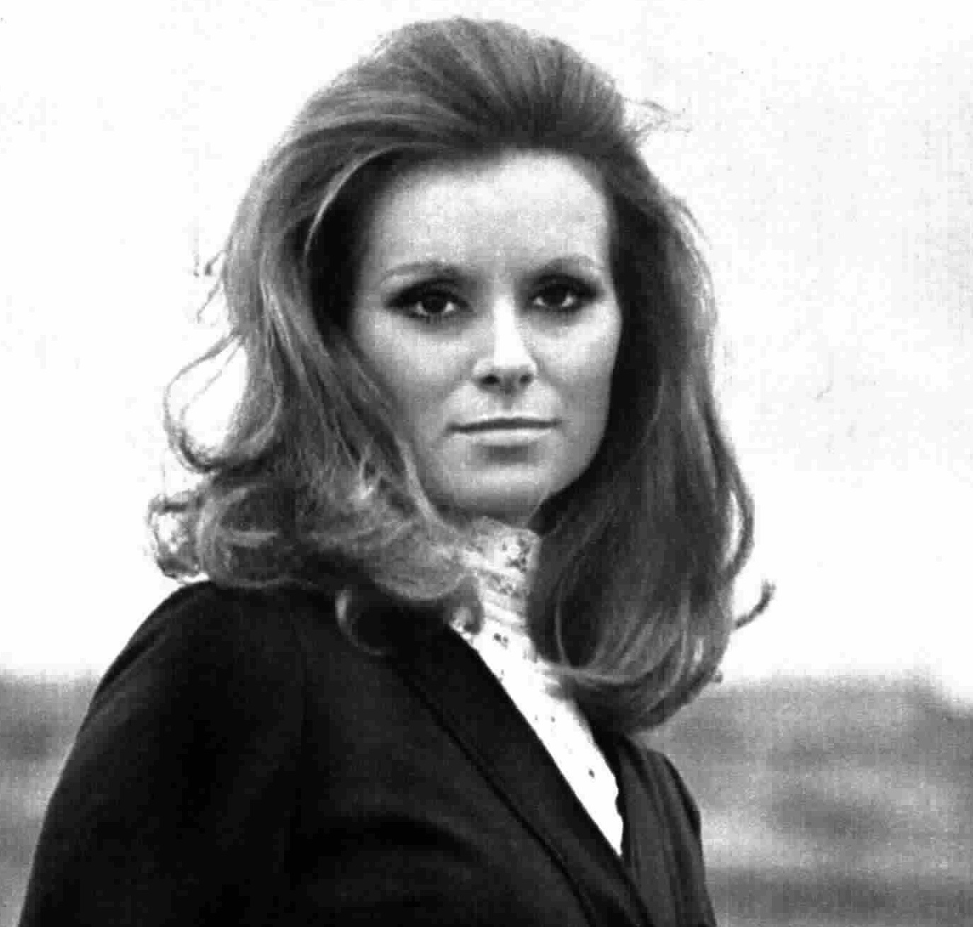 Italian television presenter Paola Perissi